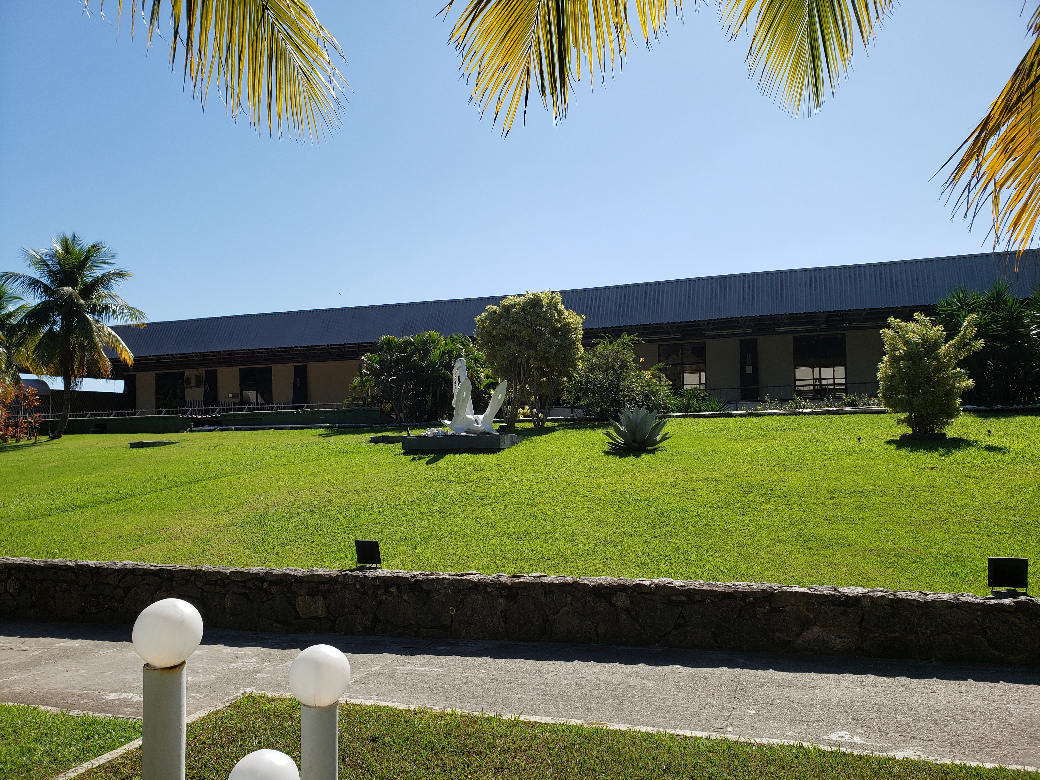 Clube Naval do Rio de Janeiro sede de Charitas, em Niterói.